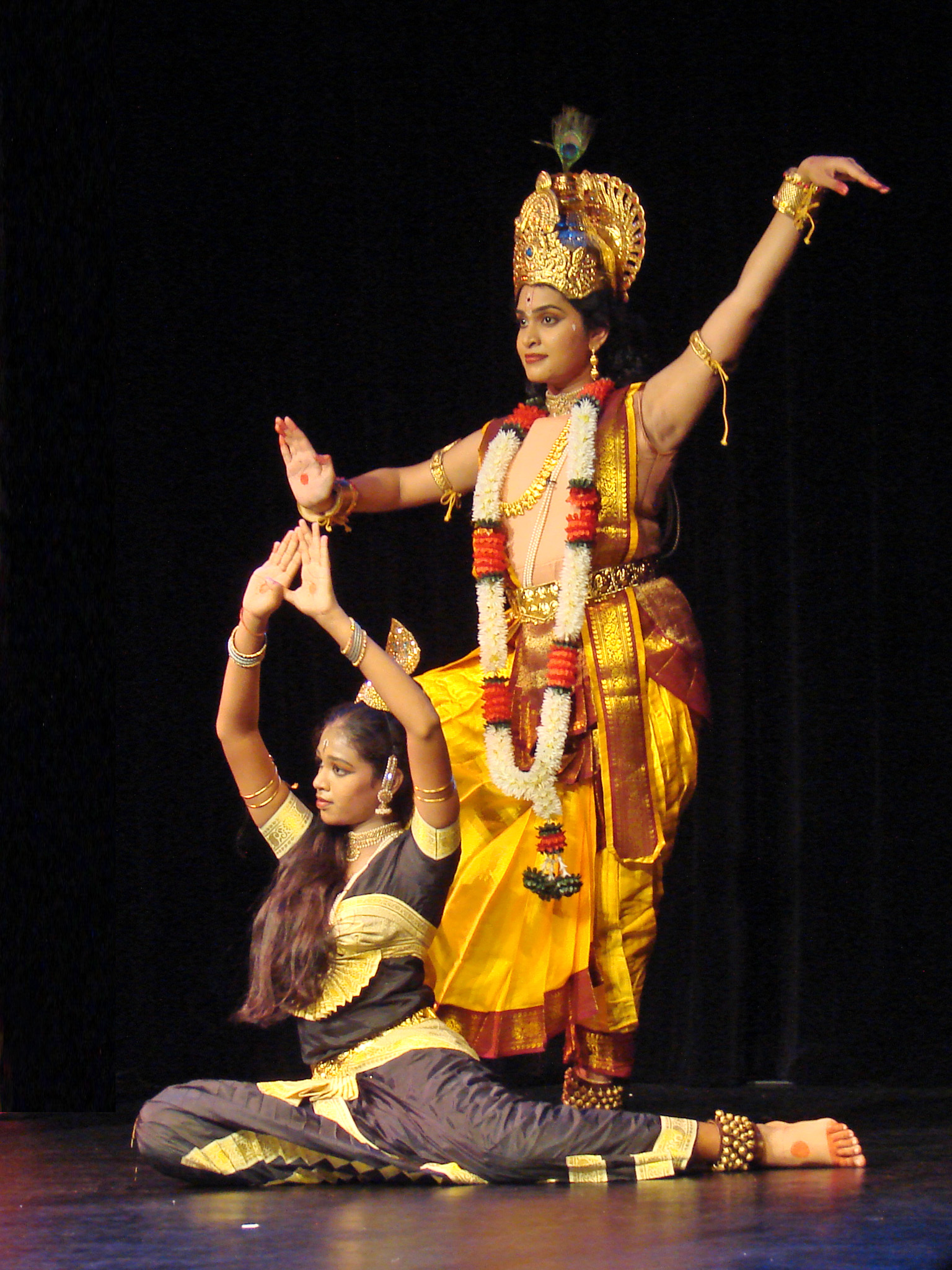 Alokaye Balakrishnam, pièce de Tarangam unique dans le répertoire du Kuchipudi (composition Raga Malika et Adi Talam; chorégraphie : Kishore Mosalikanti) Danseuses : Mihira Pathuri (Krishna) et Pooja Reddy (le serpent) Spectacle de danse Kuchipudi, organisé par le service de l'auditorium du musée Guimet en coproduction avec Triveni, présenté le samedi 19 avril 2008, dans l'auditorium du musée Guimet à Paris par : "Deepika Reddy et ses musiciens" Sur la photo, les deux danseuses de la compagnie de Deepika Reddy. Ces deux jeunesartistes font partie de Deepanjali, l'institution fondée en Inde par Deepika Reddy et qui est dédiée à l’excellence de la pratique du Kuchipudi.